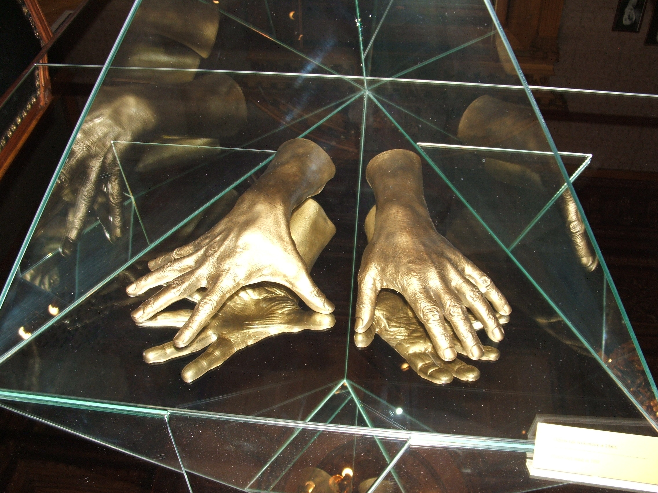 imprint hands Artur Rubinstein